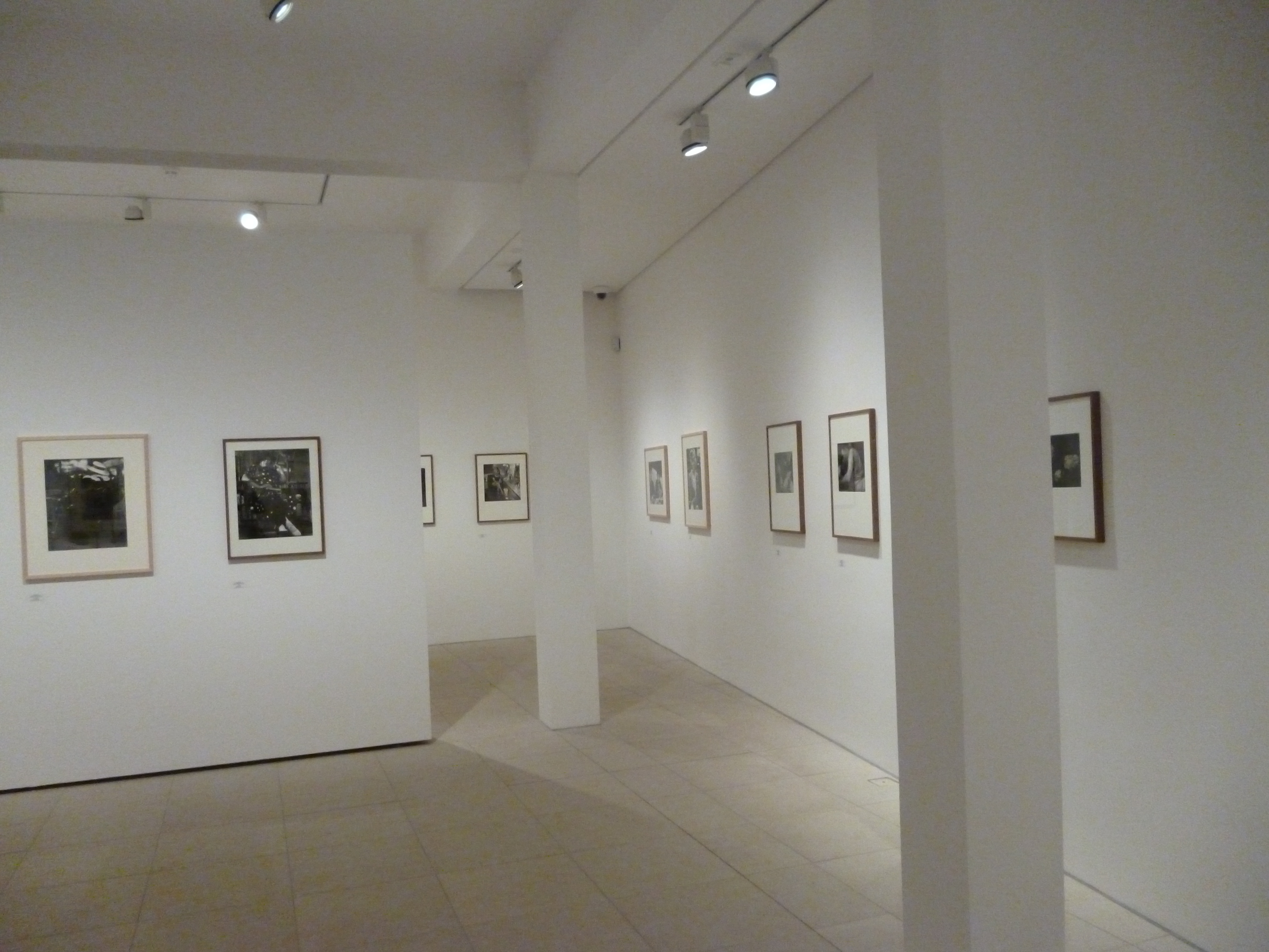 Haus Weitmar im Stadtteil Bochum-Weitmar: Ausstellungsraum im Kubus, ein Ausstellungsgebäude inmitten der Außenmauern der Ruine für die Situation Kunst.